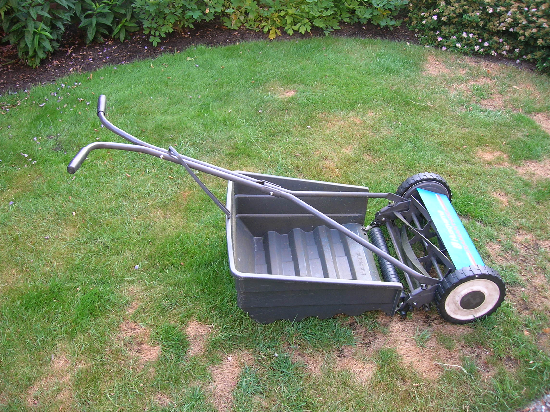 Een ouderwetse, door mankracht aangedreven grasmaaier met opvangbak voor gemaaid gras; zelfgemaakte foto, 11 juli 2006.